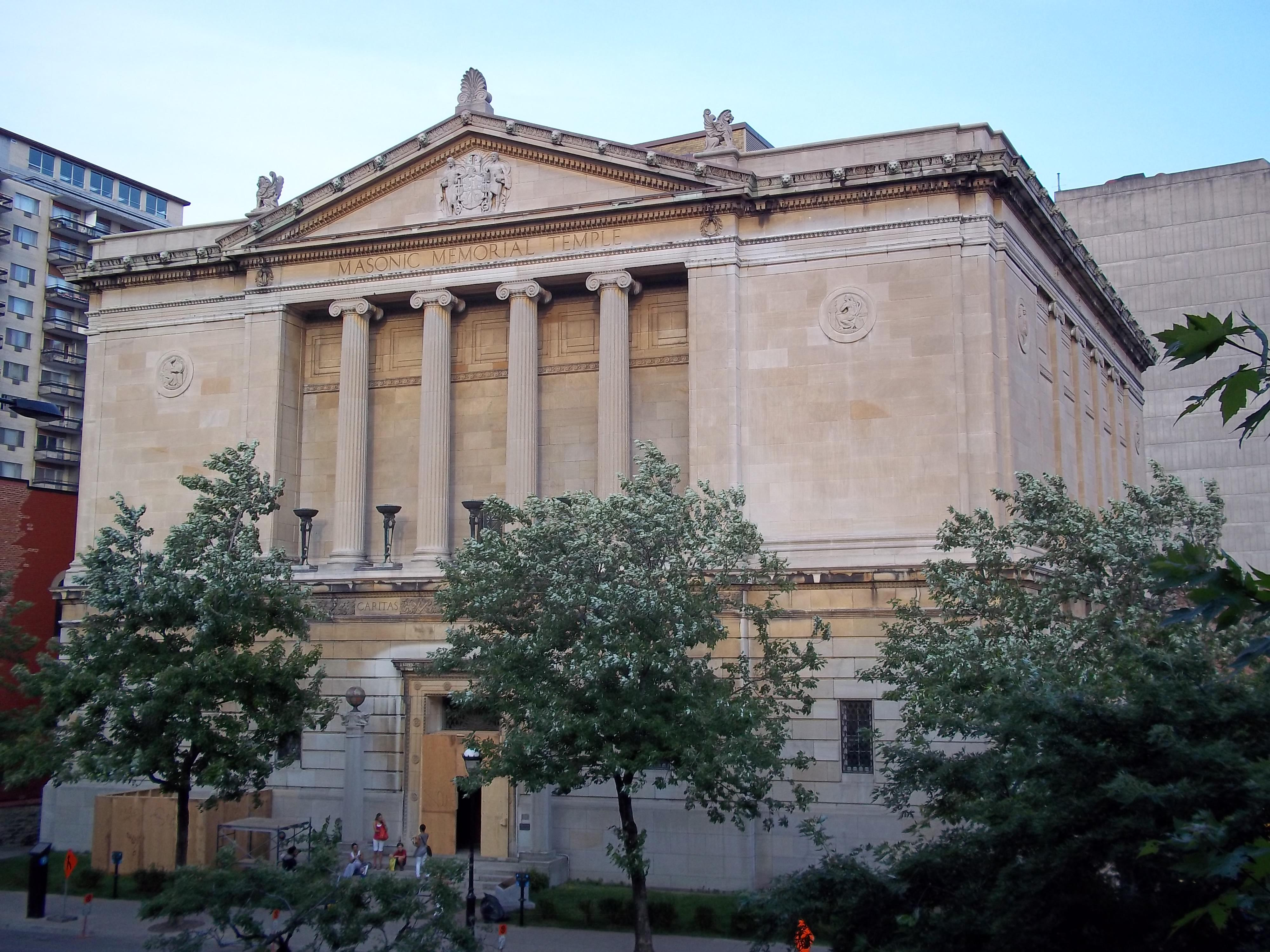 Temple maçonnique de Montréal, 1850 rue Sherbrooke ouest